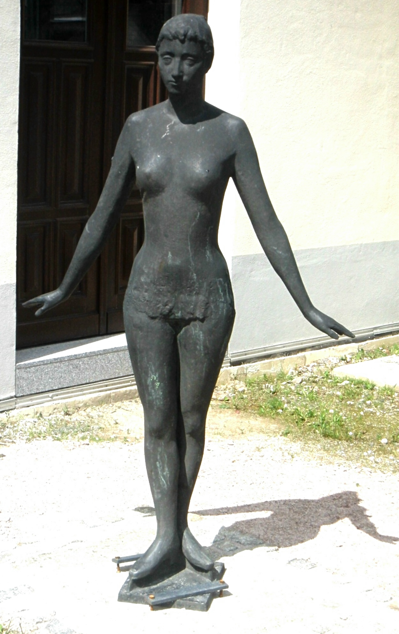 Wilhelm Landgraf, 1961 Bronzefigur Eiskunstläuferin, Dauerleihgabe des Chemnitzer Eisstadions nach Lößnitz im Erzgebirge